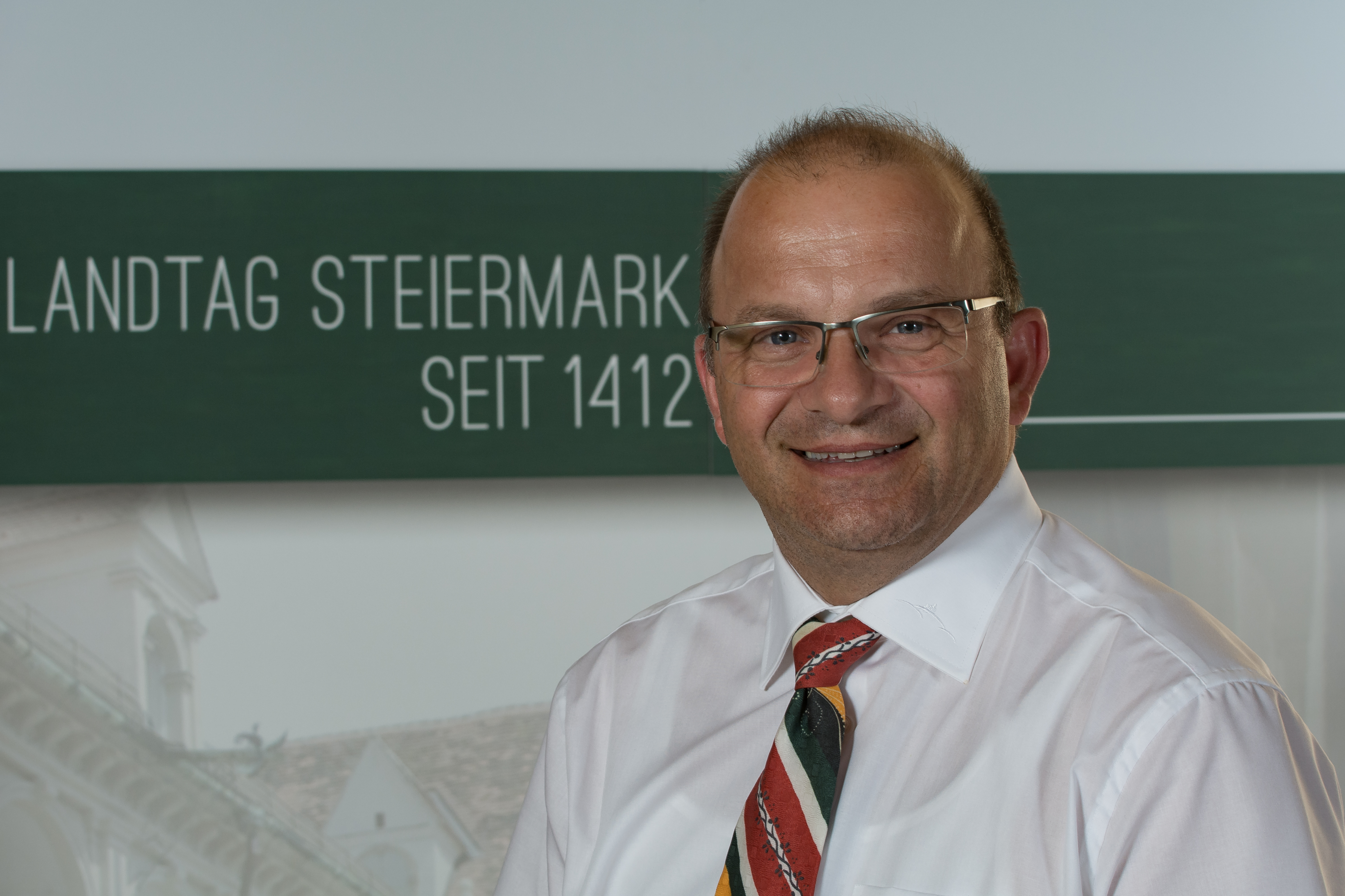 Anton Gangl, ÖVP, 2016 Abgeordneter zum Steiermärkischen Landtag